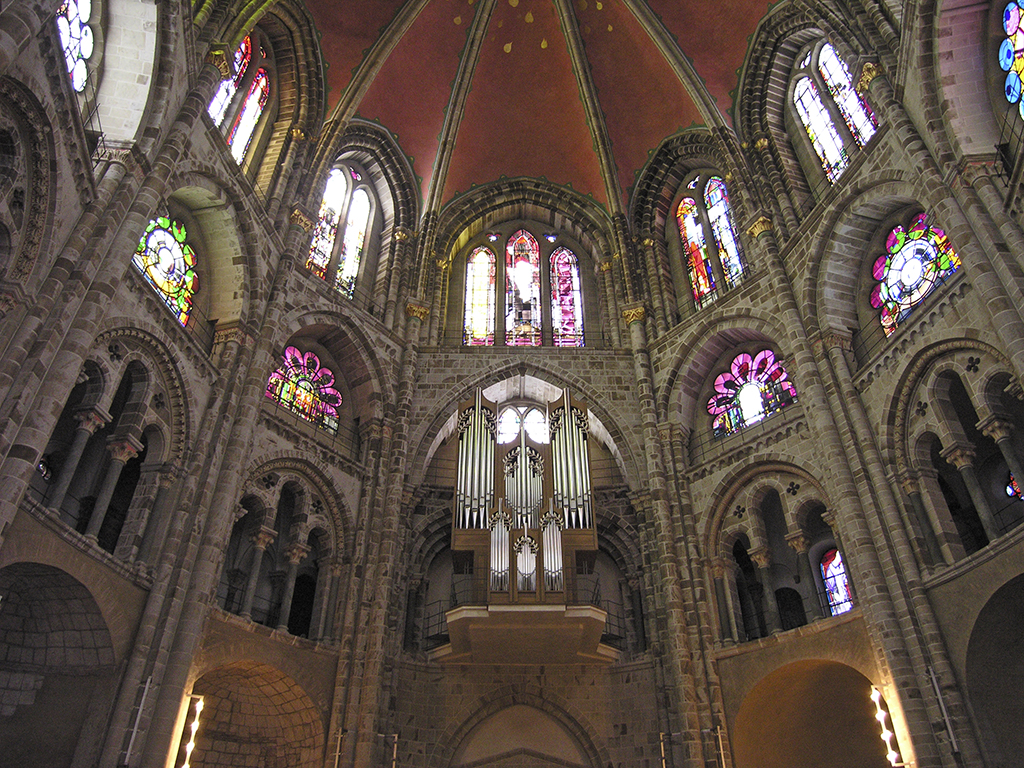 Köln, St.Gereon, Orgel im Dekagon